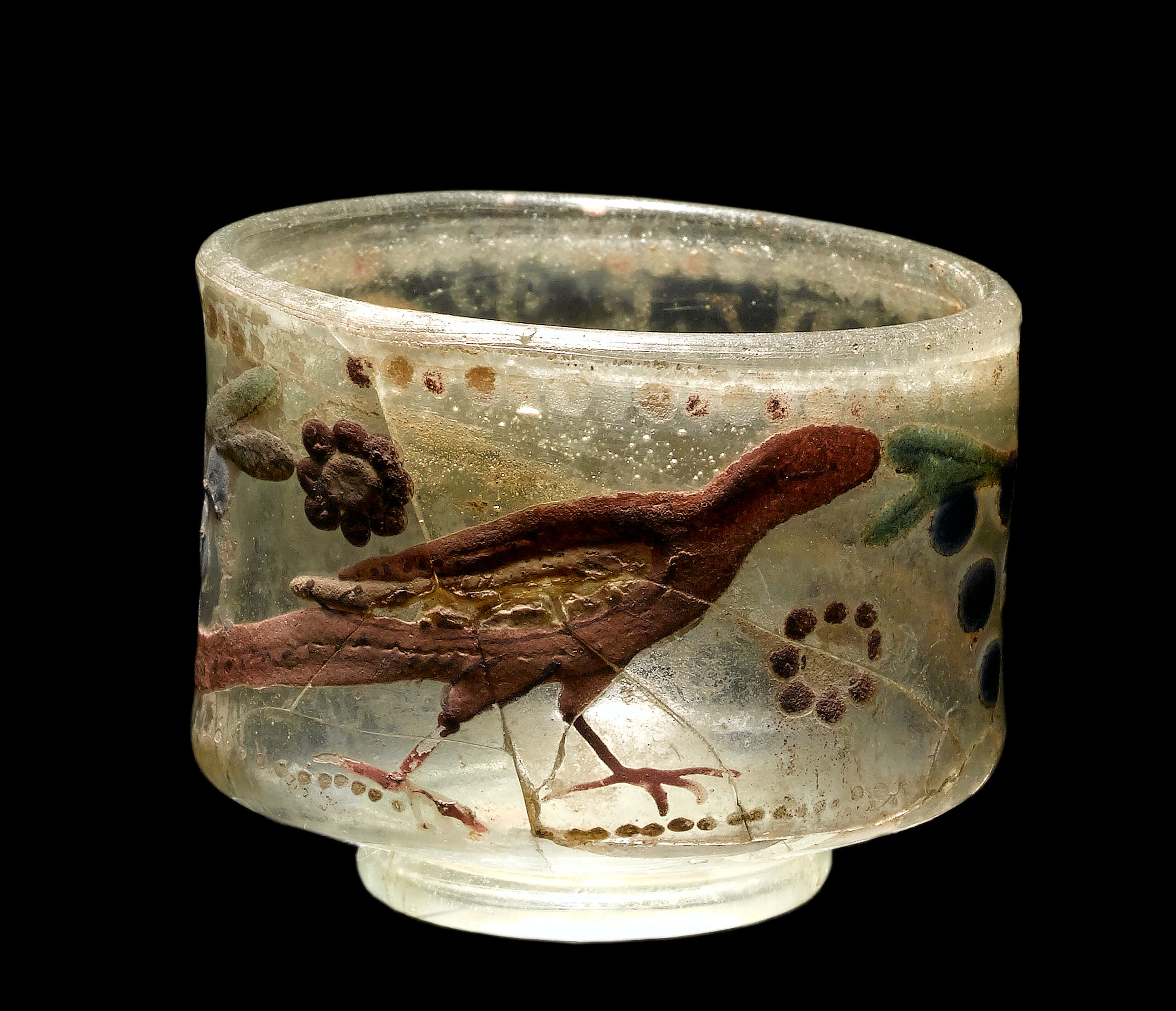 Cirkusbæger dekoreret med blomster og fugle, YROM, Varpelev